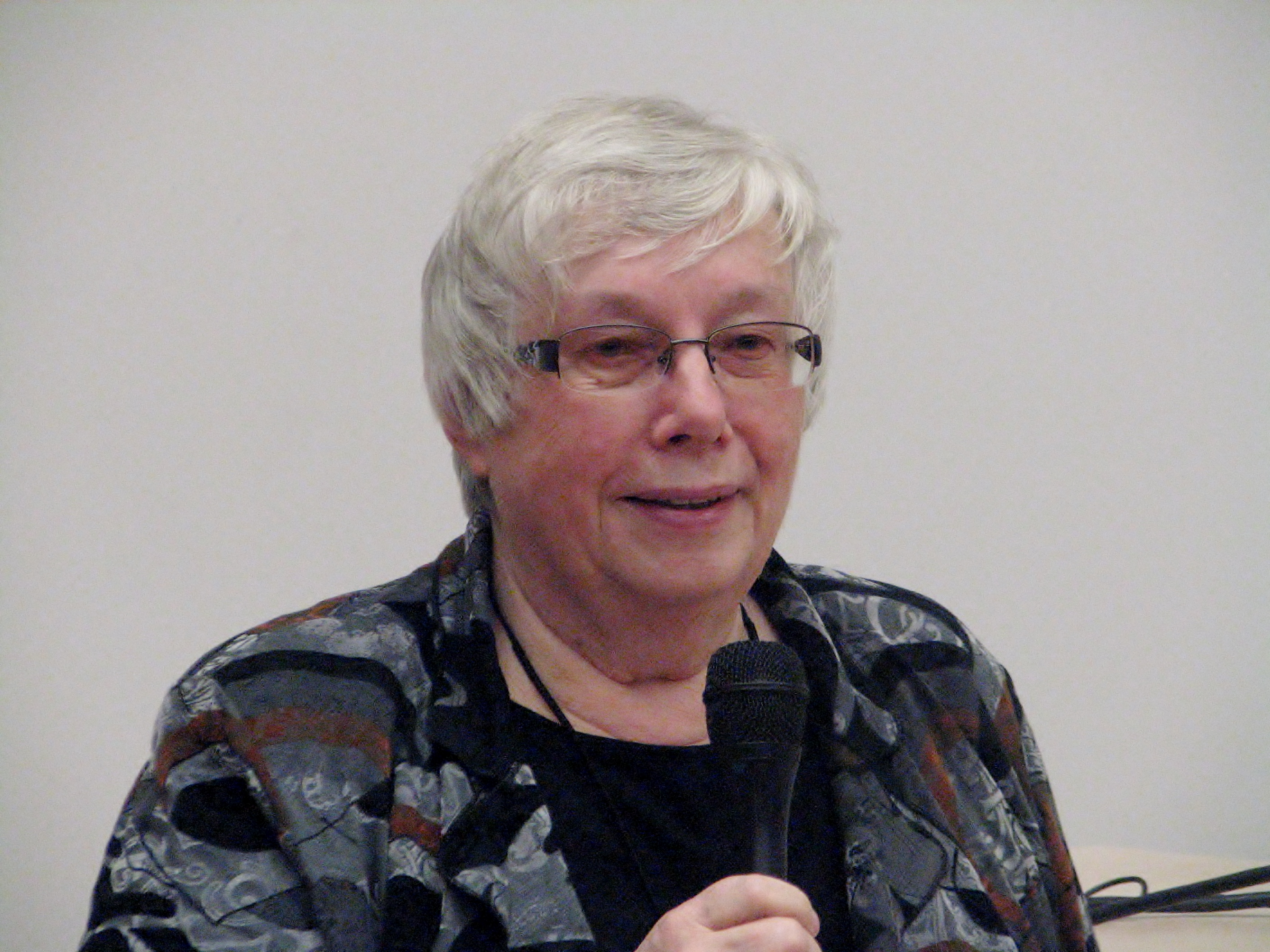 Marju Lauristin esinemas Tallinna Ülikoolis Eesti Humanitaarinstituudi sünnipäeva puhul korraldatud konverentsil "Eesti humanitaarne tulevik"